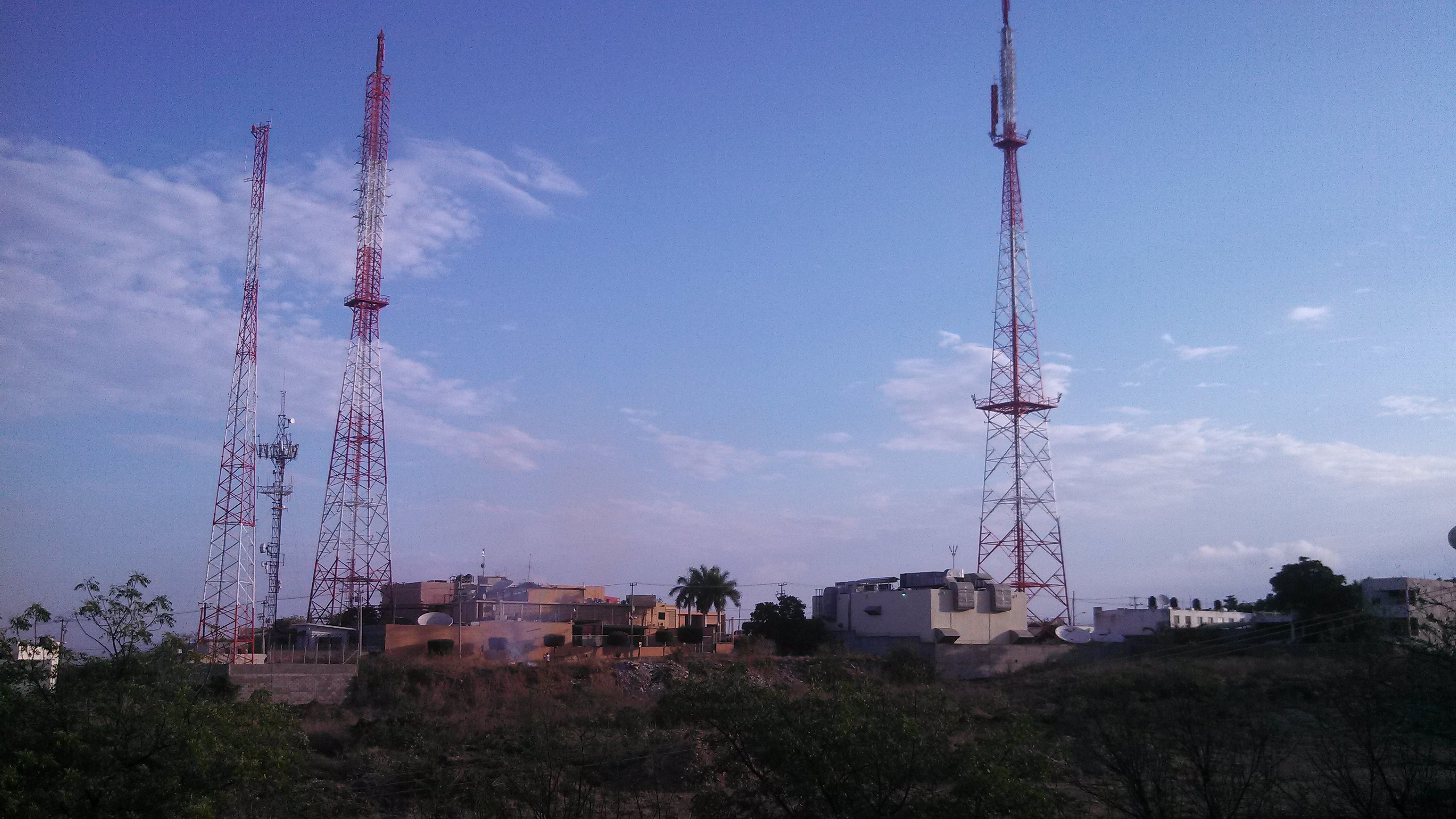 Vistas desde Montebello